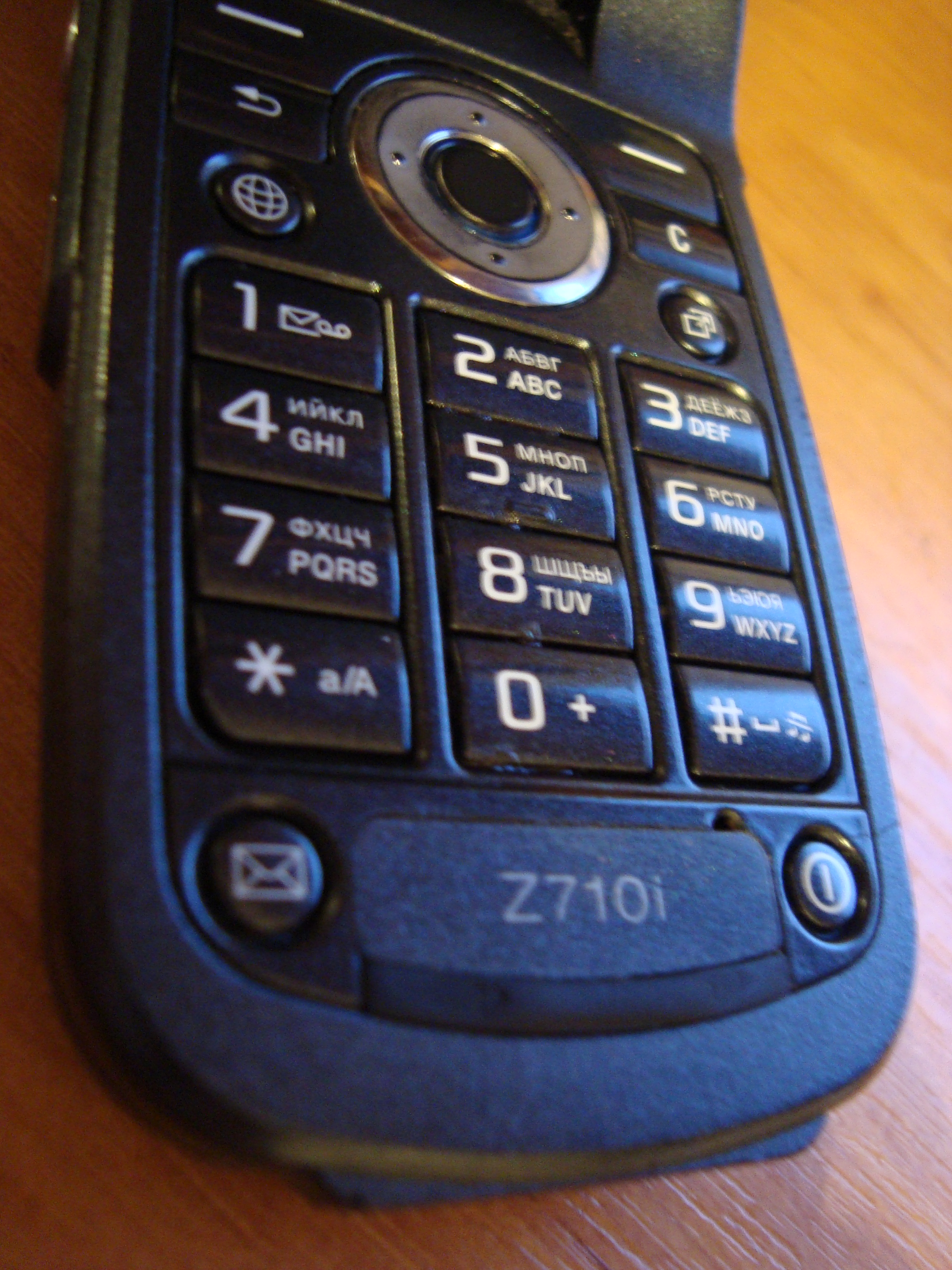 клавиатура телефона Z710i, фотографировал перед загрузкой (дата видна на экране телефона)